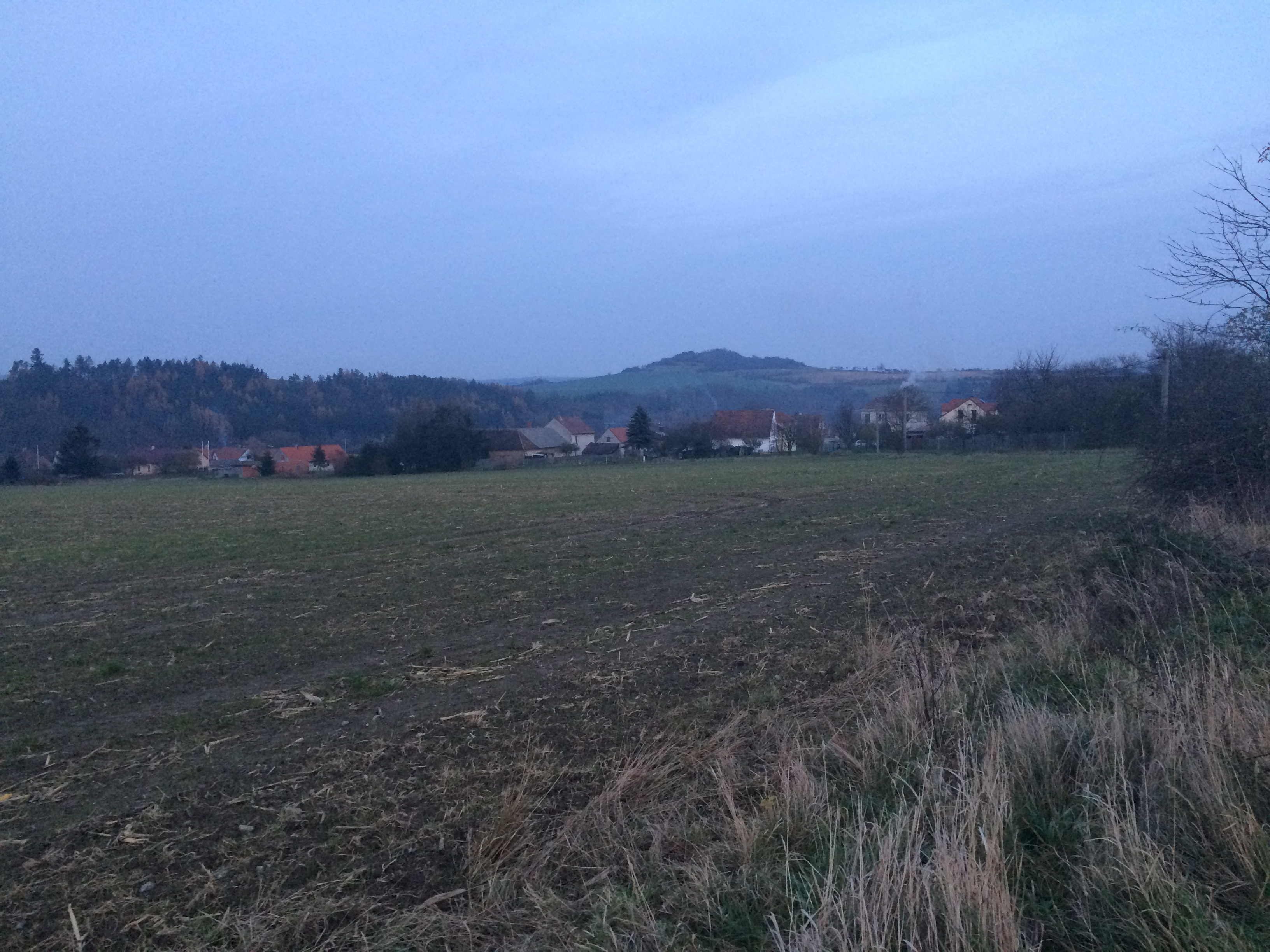 Pohled na místní část Vlčice od osady Nová Huť